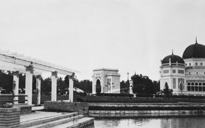 Foto. Gezicht van bij de vijver in het Derikanpark op de Grote Moskee